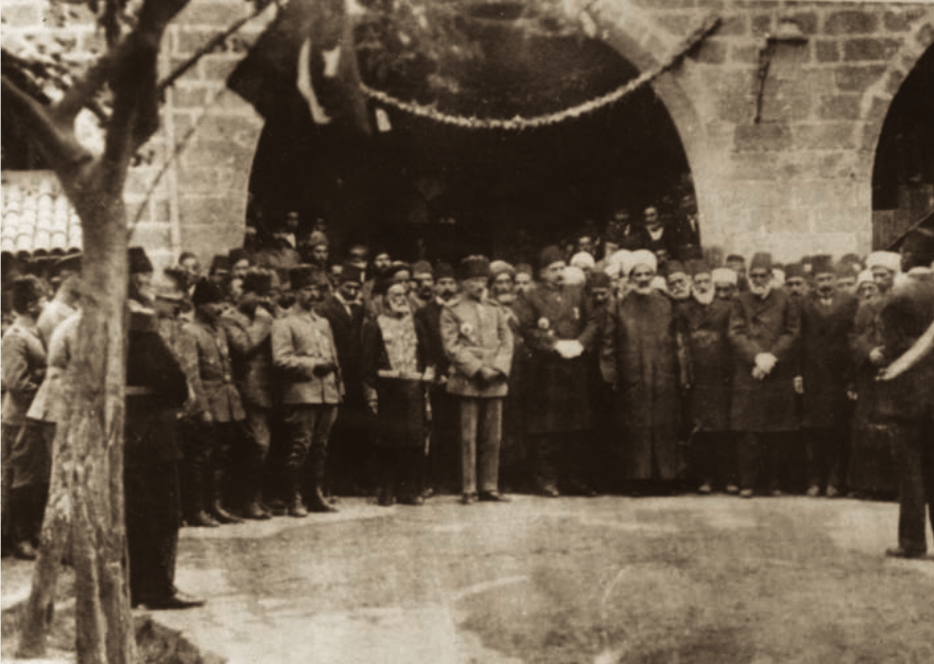 2’nci Ordu Komutanı Mustafa Kemal Paşa, Diyarbakır, Mart 1917